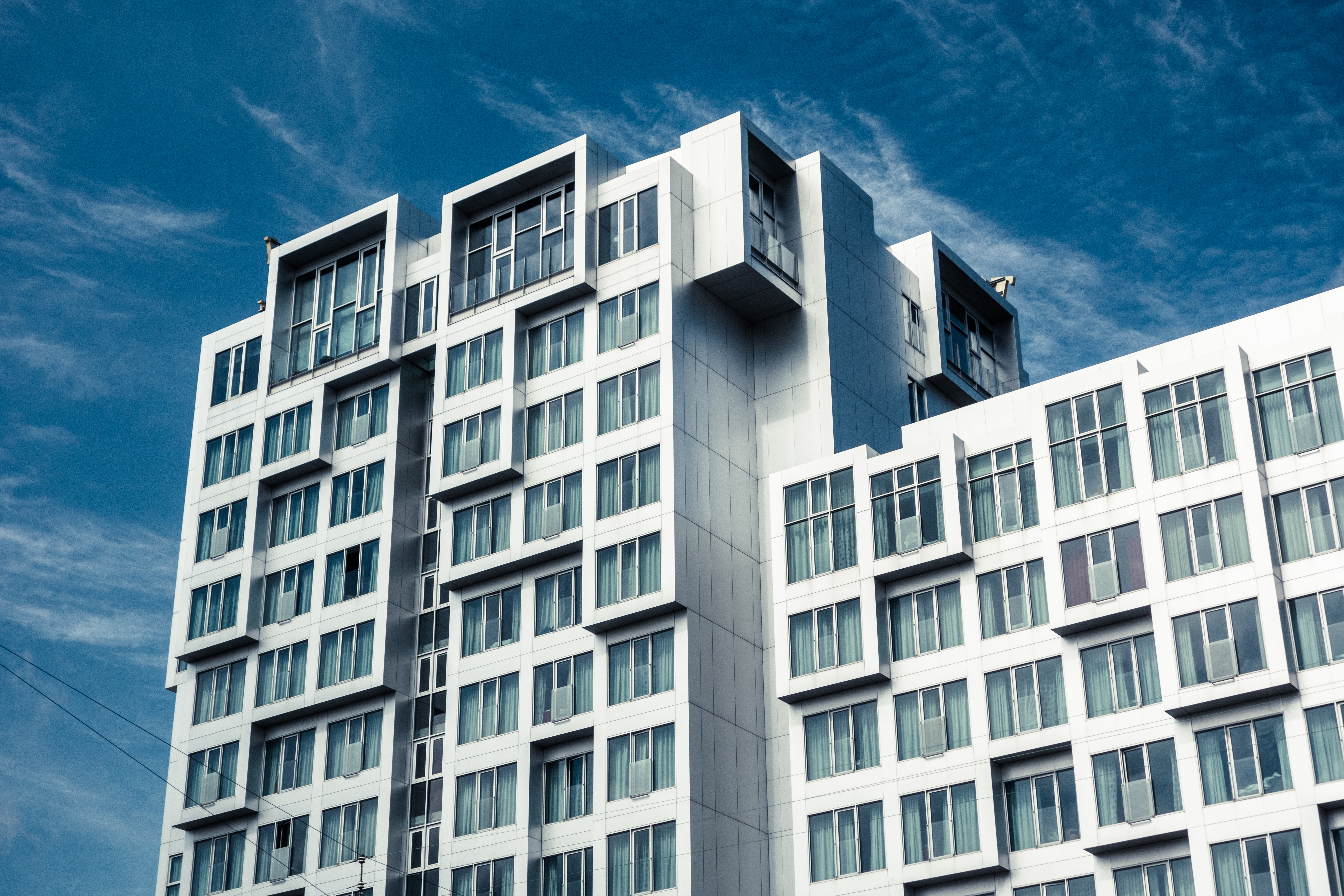 Tivoli Hotel in Copenhagen, Denmark